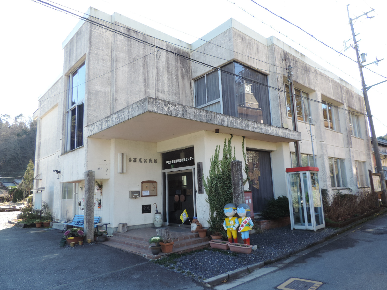 多羅尾公民館（滋賀県甲賀市信楽町多羅尾）。2019年12月撮影。